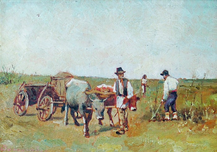 Ludovic Bassarab (1866-1933) - La câmp, compoziţie cu ţărani muncind la câmp, ulei pe carton, semnat stânga jos cu brun, 16,5x12 cm.